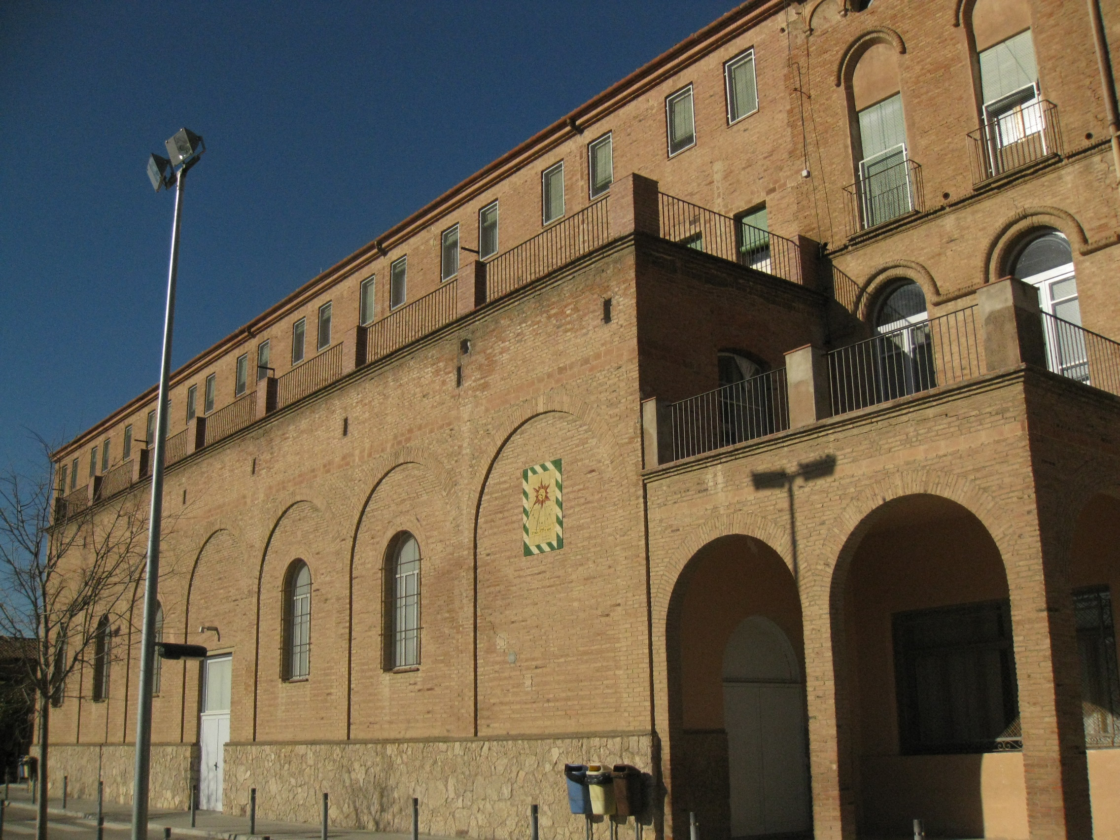 Escoles Pies, més conegut com «els Escolapis», situat al carrer del Col·legi núm. 10-16 (Terrassa). Edifici historicista de mitjan segle XIX. Vista de la façana sud, que dóna als camps d'esports.